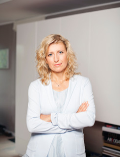 Lianos Ruokytės Jonsson portretas